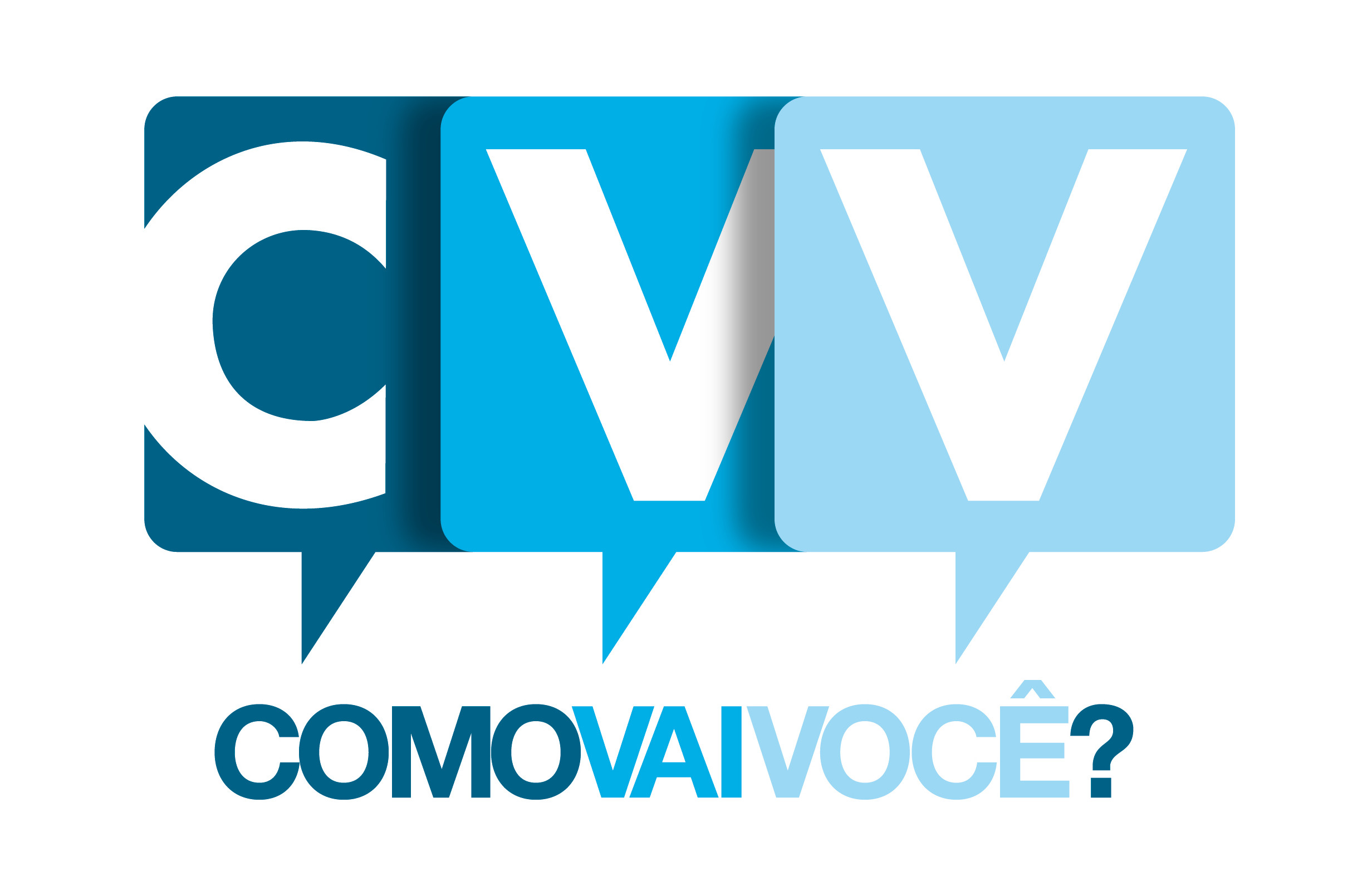 CVV